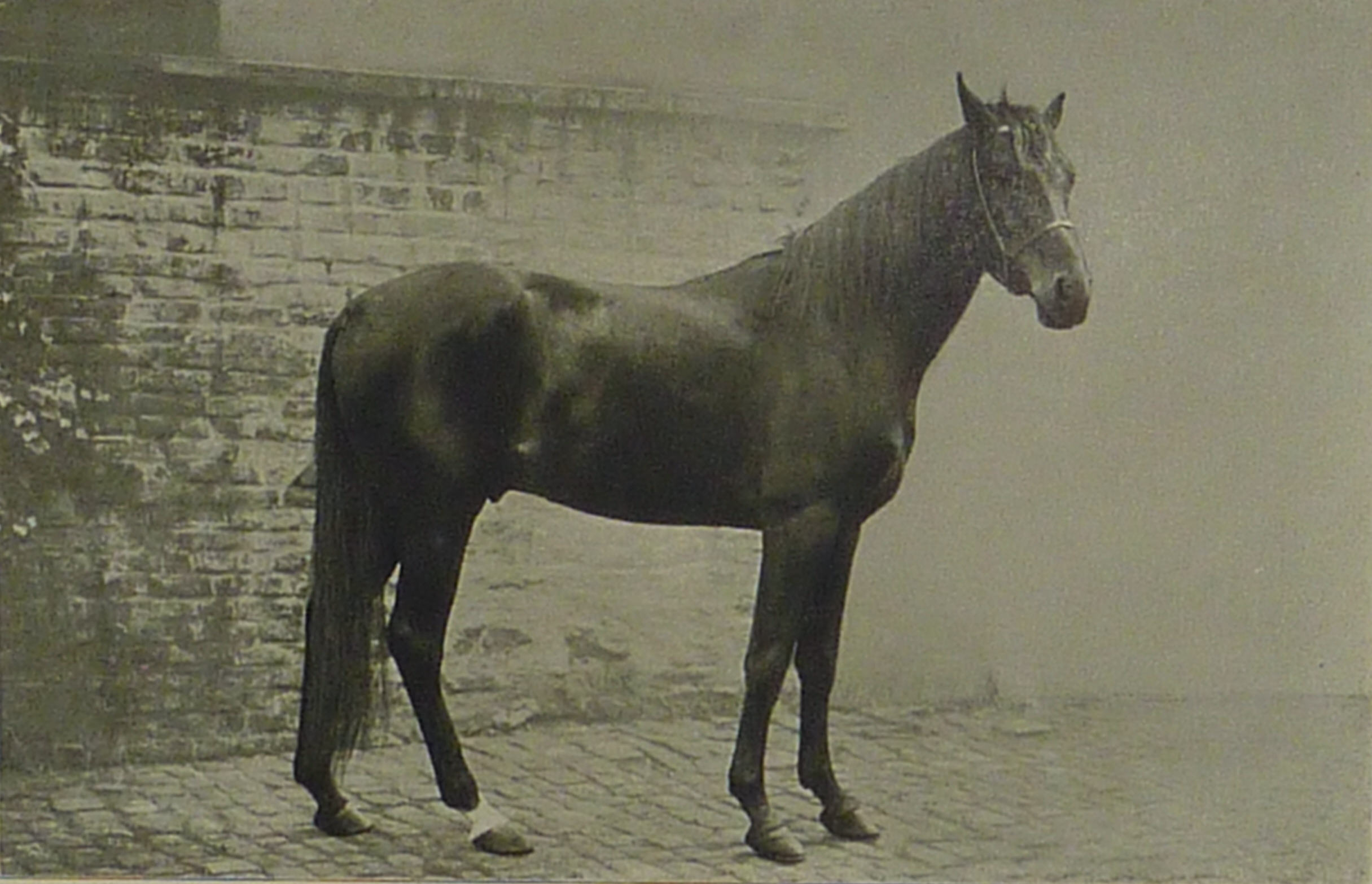 Der Hengst Muhamed, mit dem Karl Krall in Elberfeld experimentierte, 1910